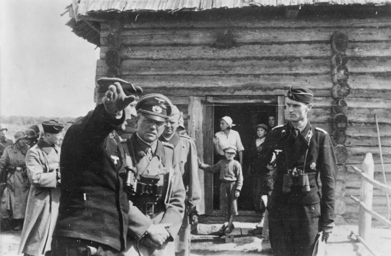 Generaloberst Guderian auf dem Gefechtsstand eines Panzerregiments. Ständig steht der General in der vordersten Front. Hier besucht er den Gefechtsstand eines Panzerregiments, um sich von dem planmässigen Verlauf des Vormarsches zu überzeugen. PK-Huschke-Scherl. 20.8.41 [herausgabedatum] "Fr" OKW